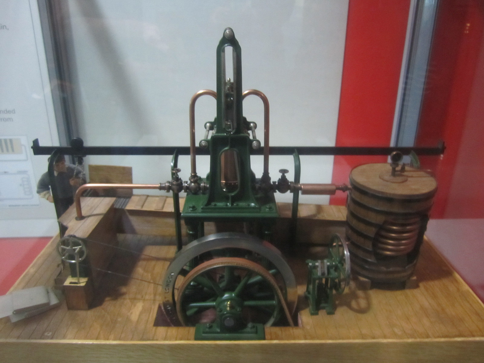 १८व्या शतकातील बर्फ बनवण्याचे सयंत्र. यंत्रात दिसत असलेल्या गुंडाळीमध्ये तेल आहे हे तेल त्या गुंडाळीतून दाबाने सोडले असता त्यातील उष्णता बाहेर पडते व ते थंड होते. हे थंड झालेले तेलाच्या नळ्या पाण्यातून नेल्या असता पाणीही थंड होते. याचा उपयोग करून बर्फ बनवला जातो.